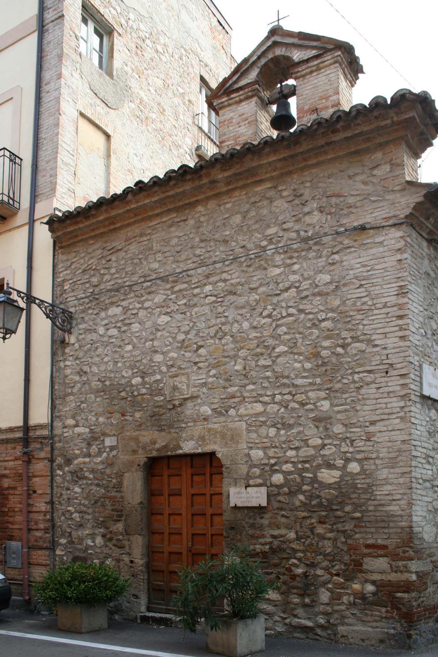 Chiesa di San Luca nella città di Teramo, facciata